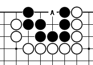 彎三（圍棋）